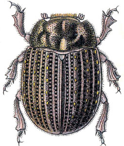 Trox sabulosus (Linnaeus, 1758)